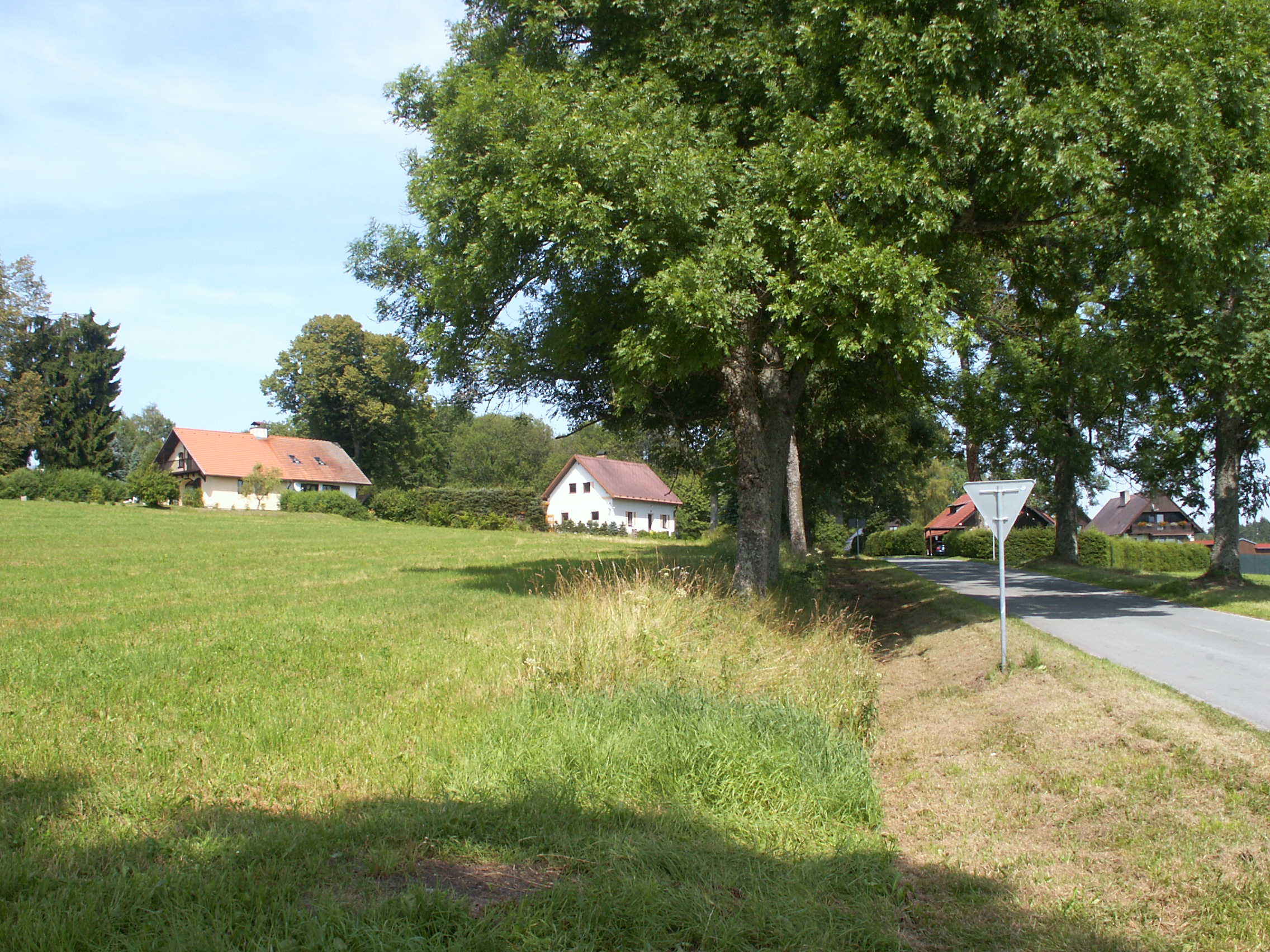 Plánička - pohled od západu